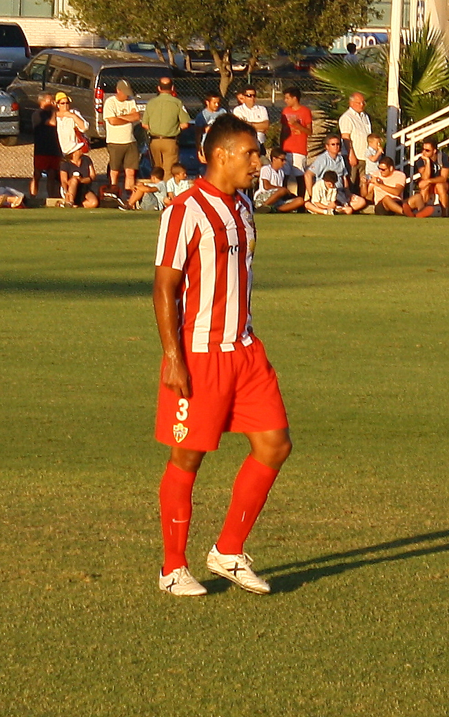 Fotografía de Marcelo Silva, jugador de la U.D. Almería